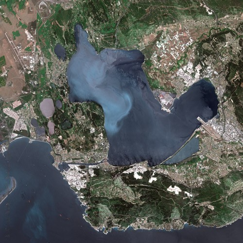 Étang de Berre by SPOT Satellite